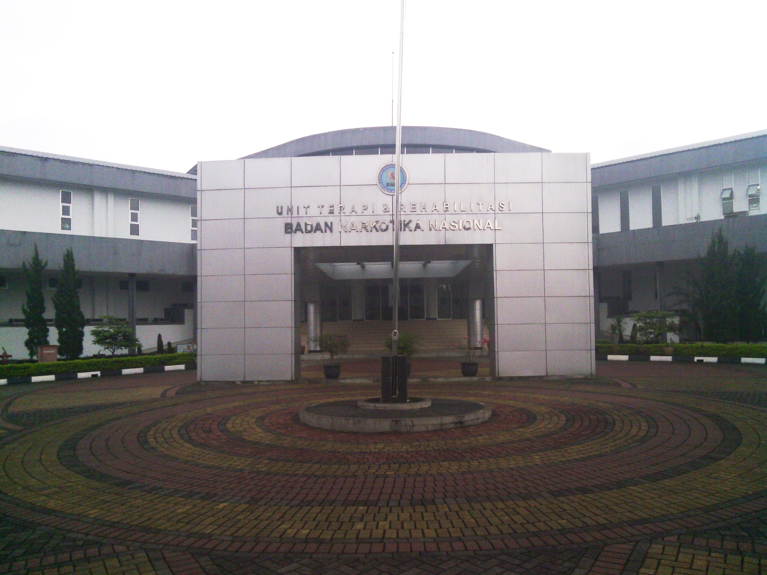 Balai Besar Rehabilitasi Badan Narkotika Nasional